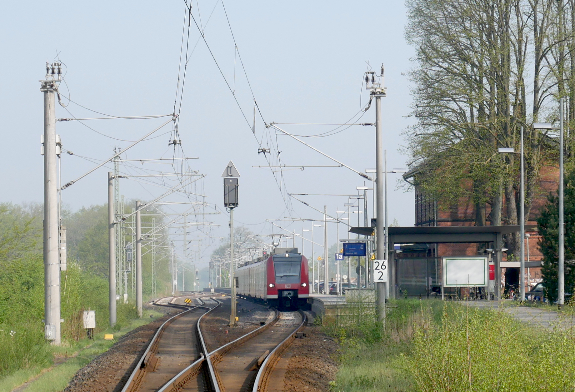 S-Bahn Hannover in Bennemühlen, Wedemark, Niedersachsen